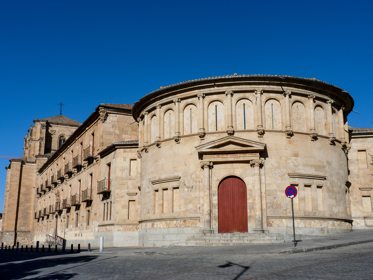 04082013 101444 SALAMANCA 0637